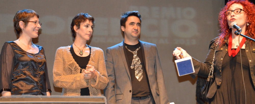 Directora de "Las Descentradas" recibiendo Premio Florencio 2013 a mejor espectáculo.